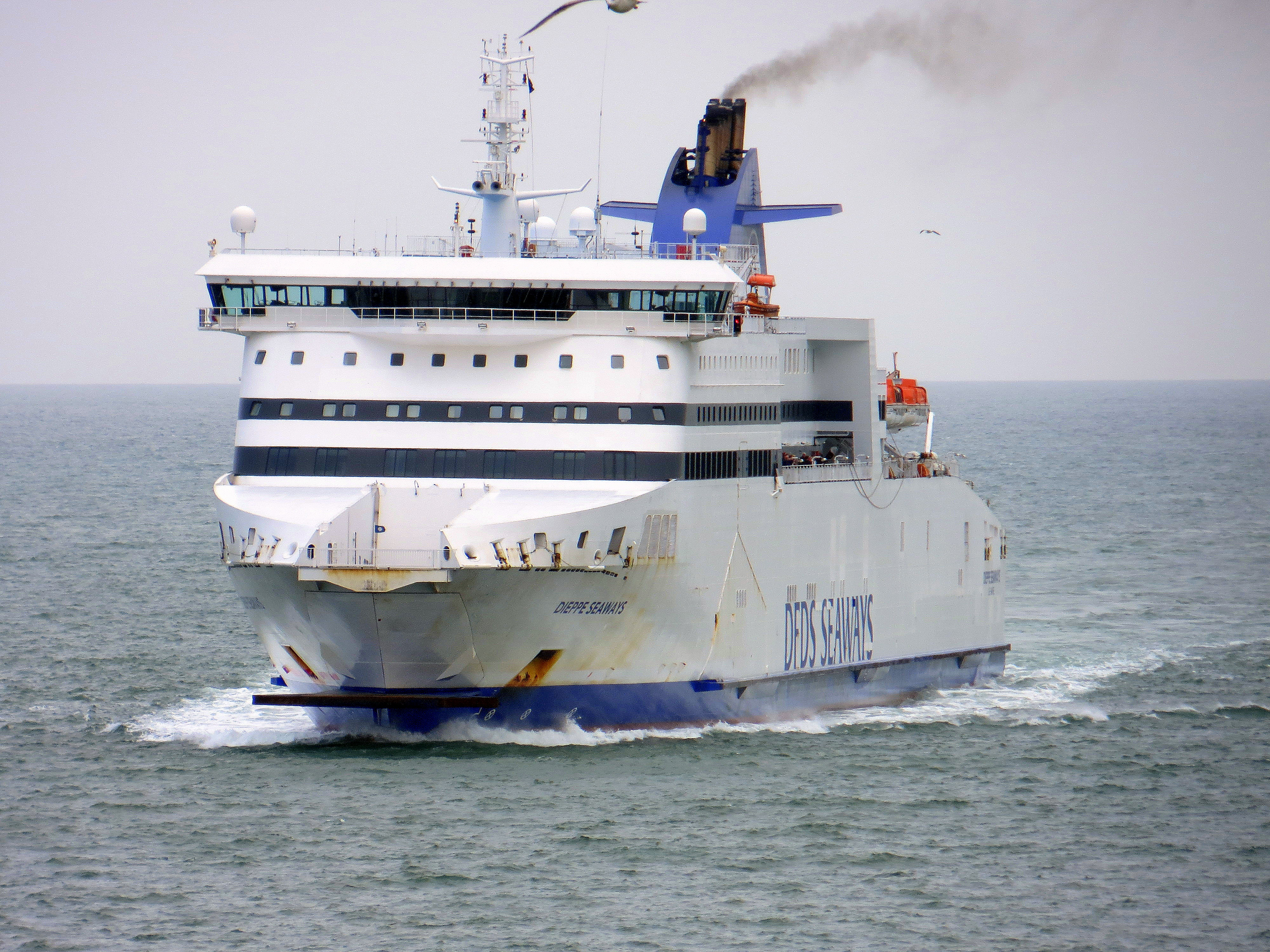 Dieppe Seaways in haar oude beschildering nadert de haven van Dover in mei 2013. Dieppe Seaways arriving in Dover in her old livery in May 2013. IMO 9211511